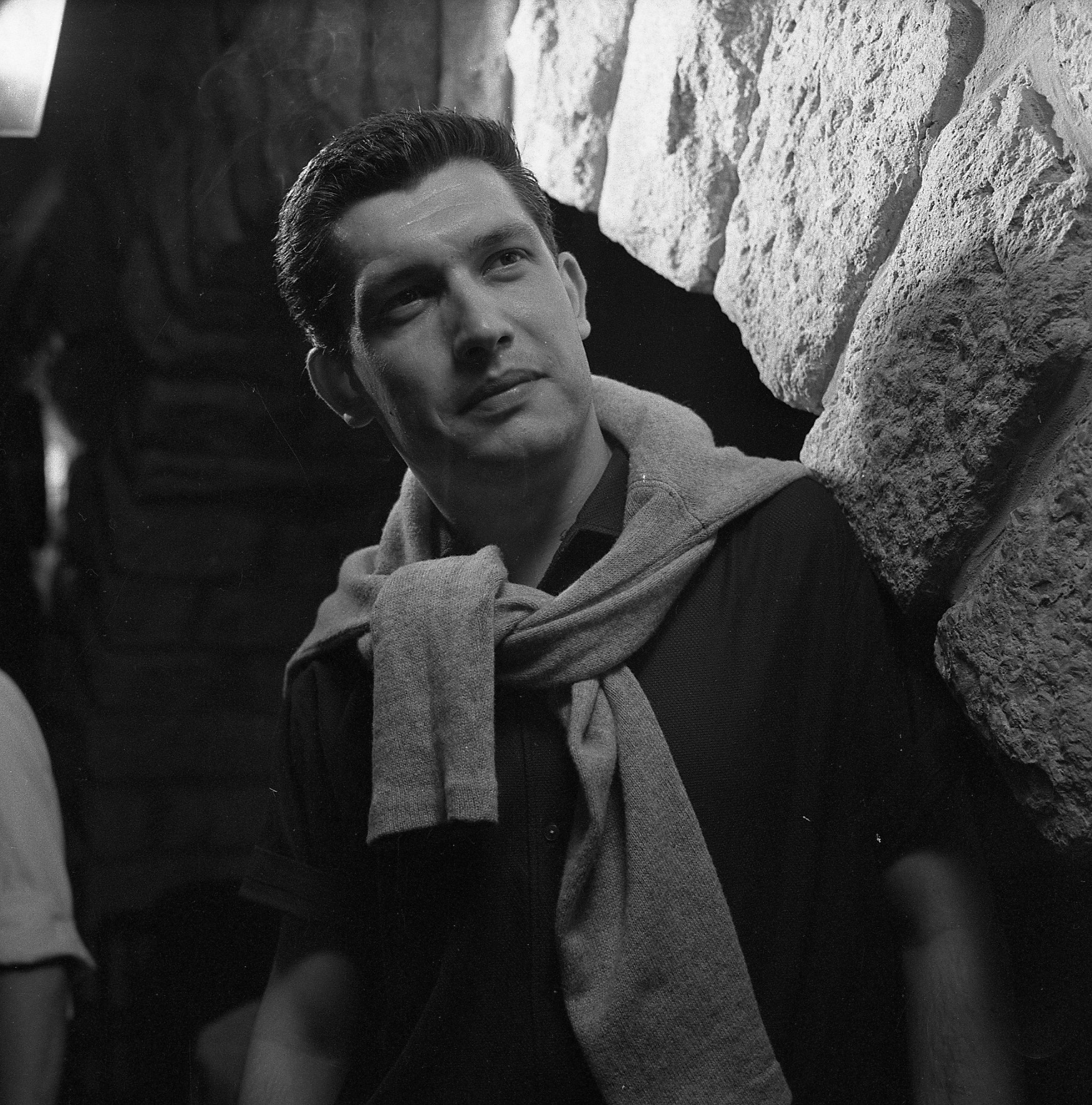 Tihomir – Tića Petrović (22. oktobar 1935. — 3. decembar 2004.) vokalni solista, kompozitor, autor muzičkih emisija i džez muzičar. foto:Stevan Kragujević (po odobrenju kćerke Tanje Kragujević)